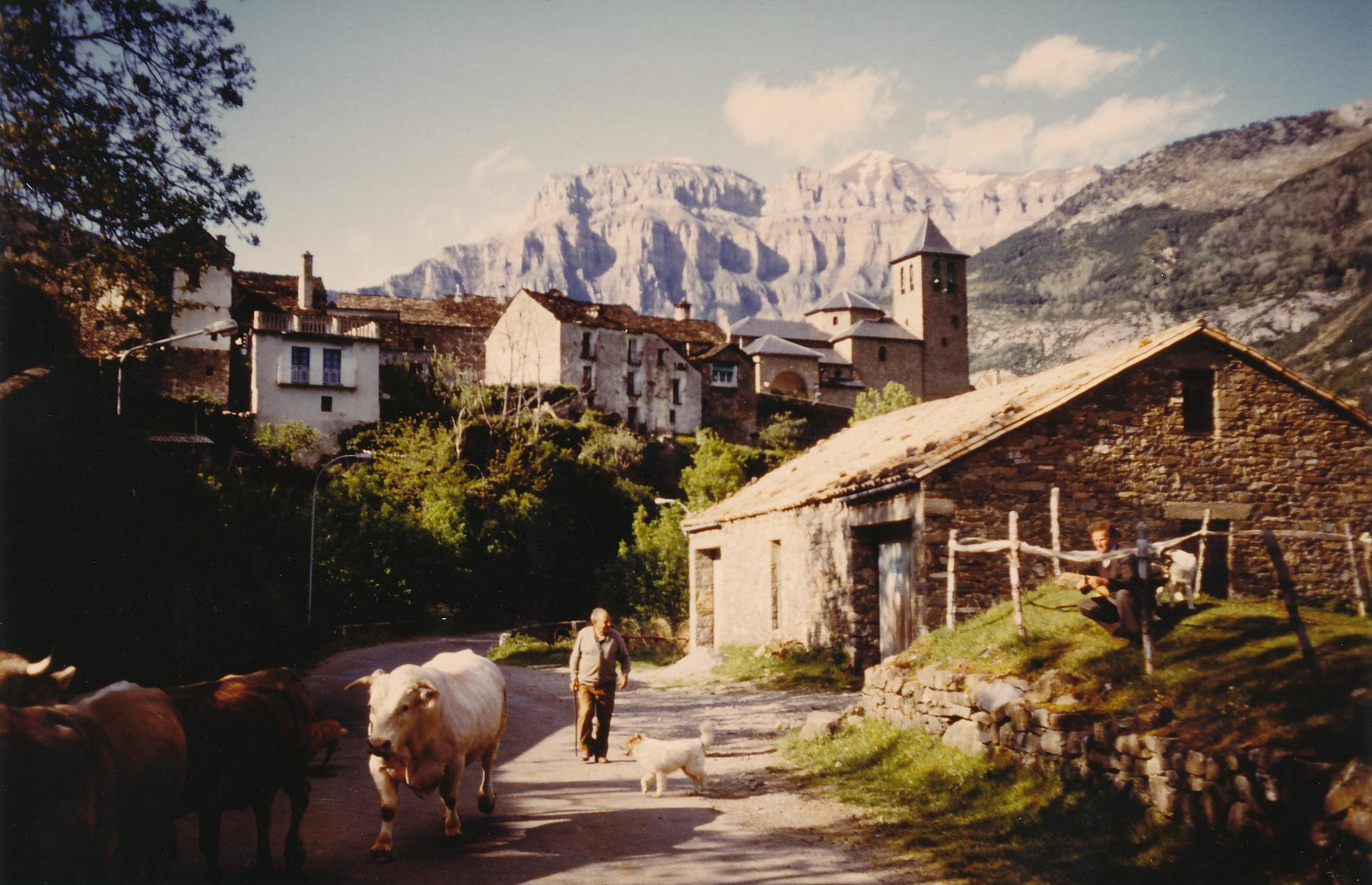 Gebirgsdorf Torla im Ordesa-Nationalpark Datum: 05/1987 Urheber: Michael Pfeiffer Quelle: privates Fotoalbum des Urhebers